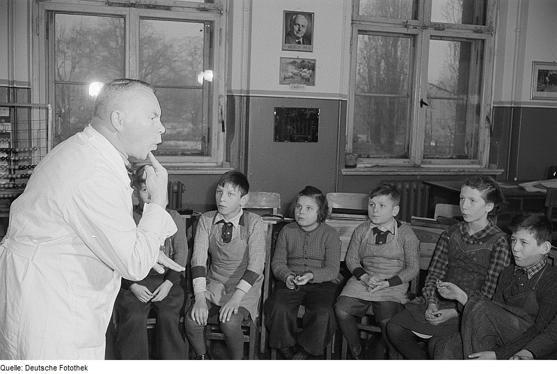 Original image description from the Deutsche Fotothek Schüler bei Sprechübungen